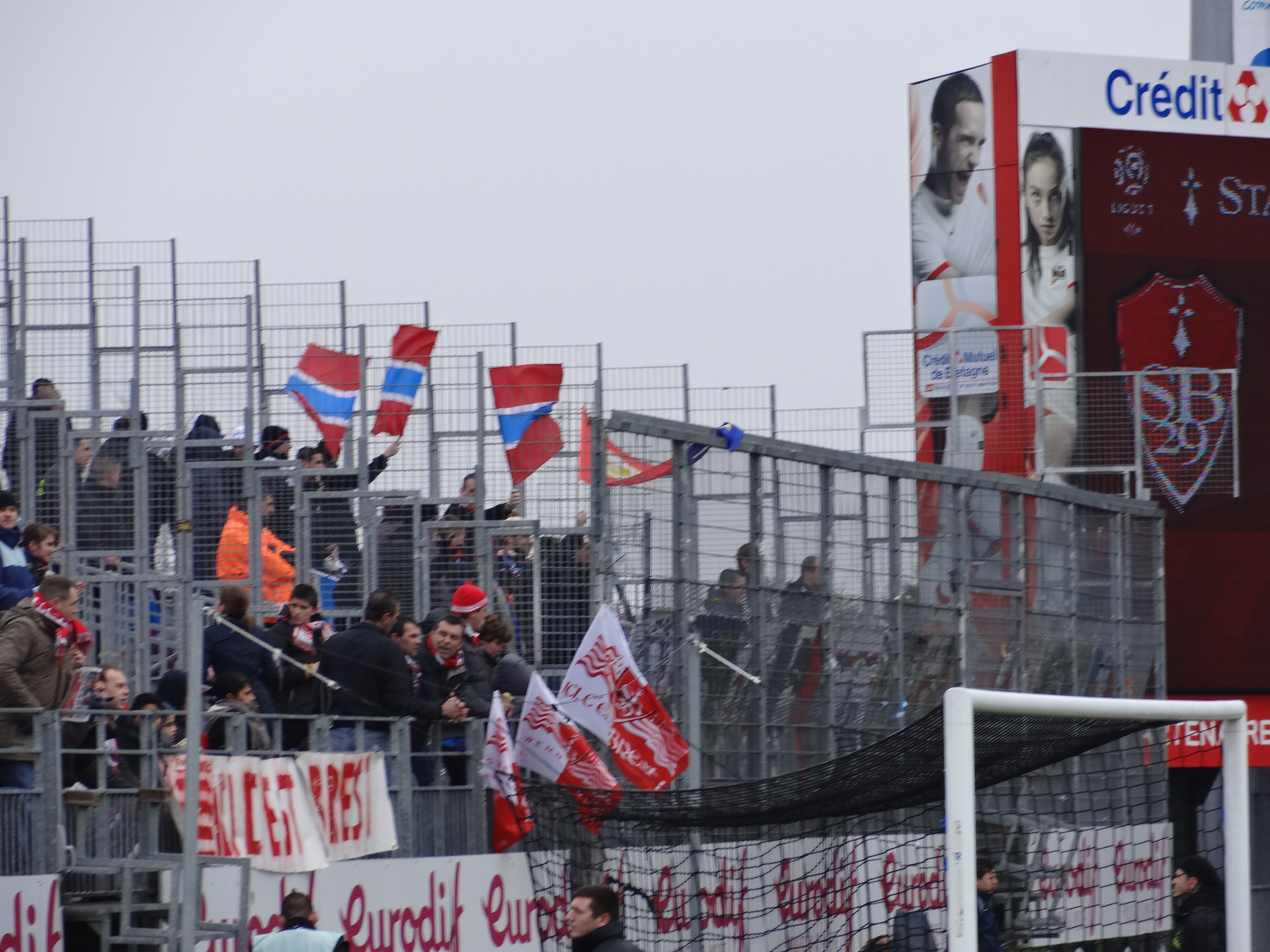 Match de football (Ligue 1) entre le Stade brestois 29 et l'Olympique lyonnais, le 3 mars 2013